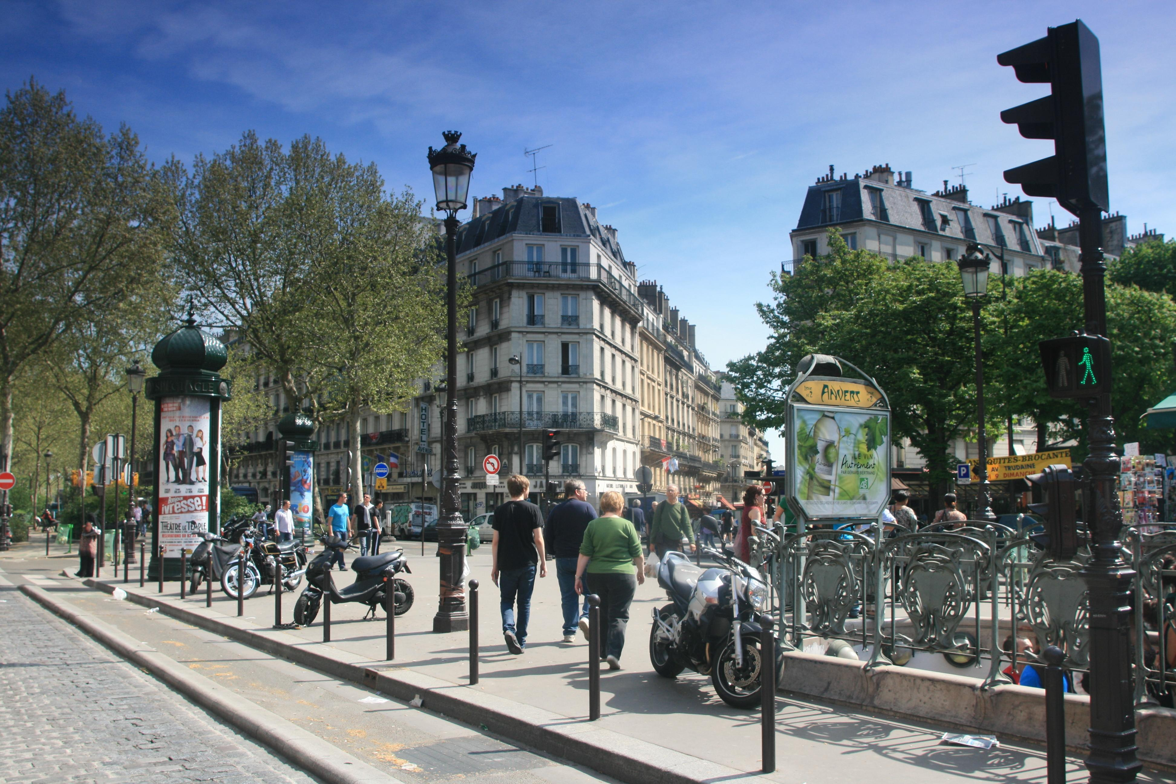 Clignancourt, 75018 Paris, France